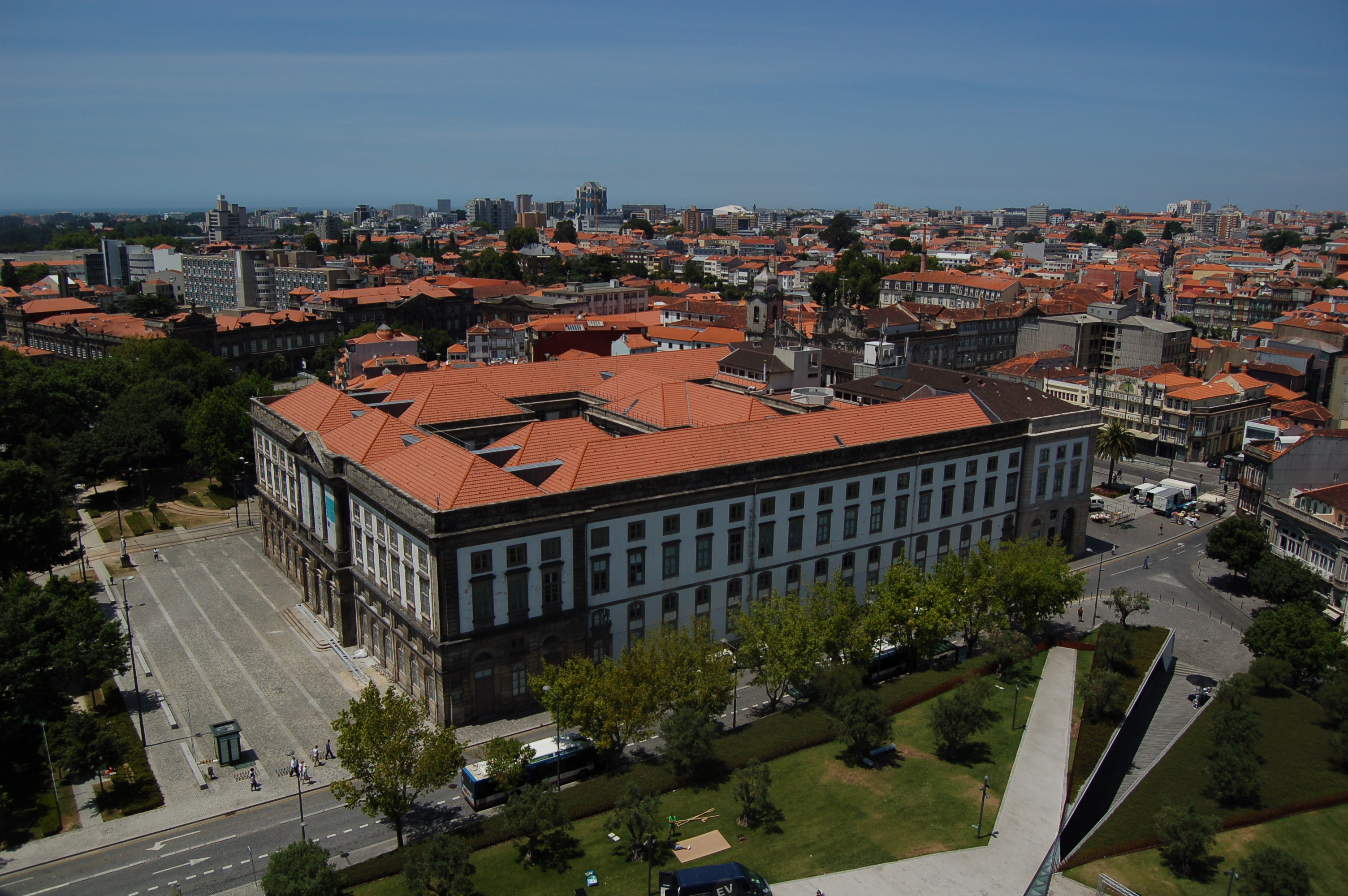 Rectorat de l'Université de Porto vue depuis la tour des Clercs